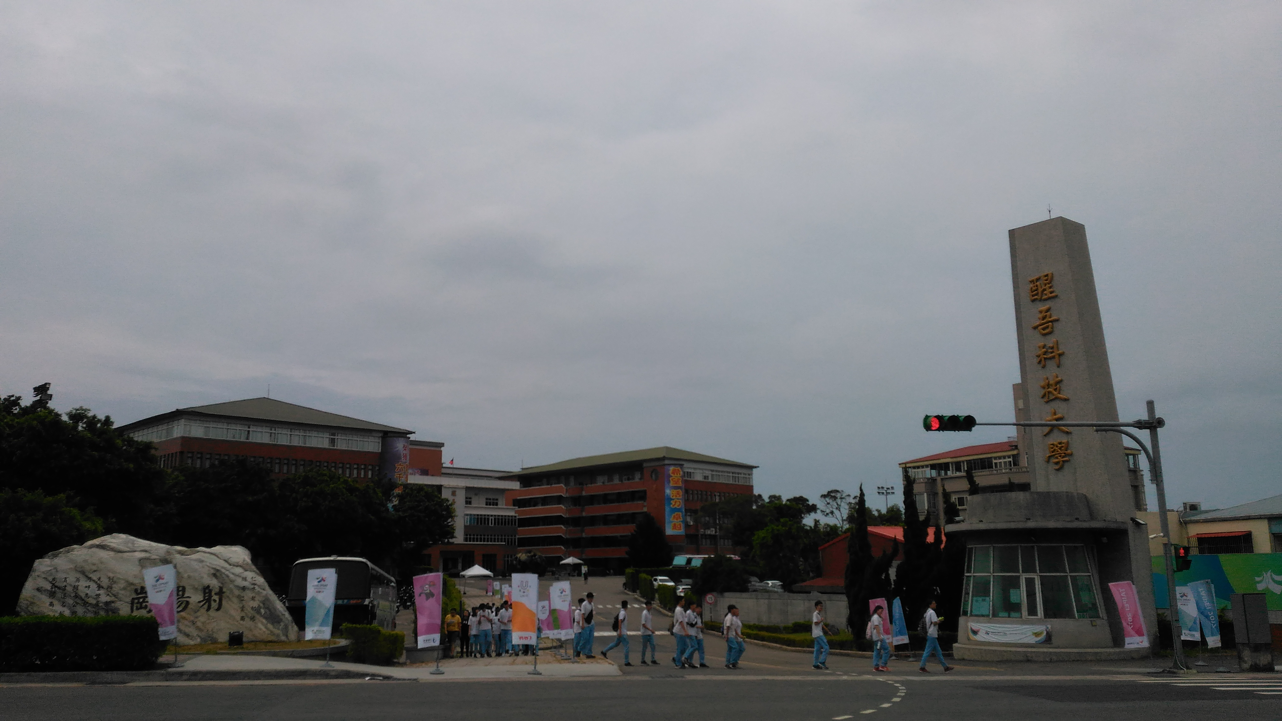 醒吾科技大學正門口